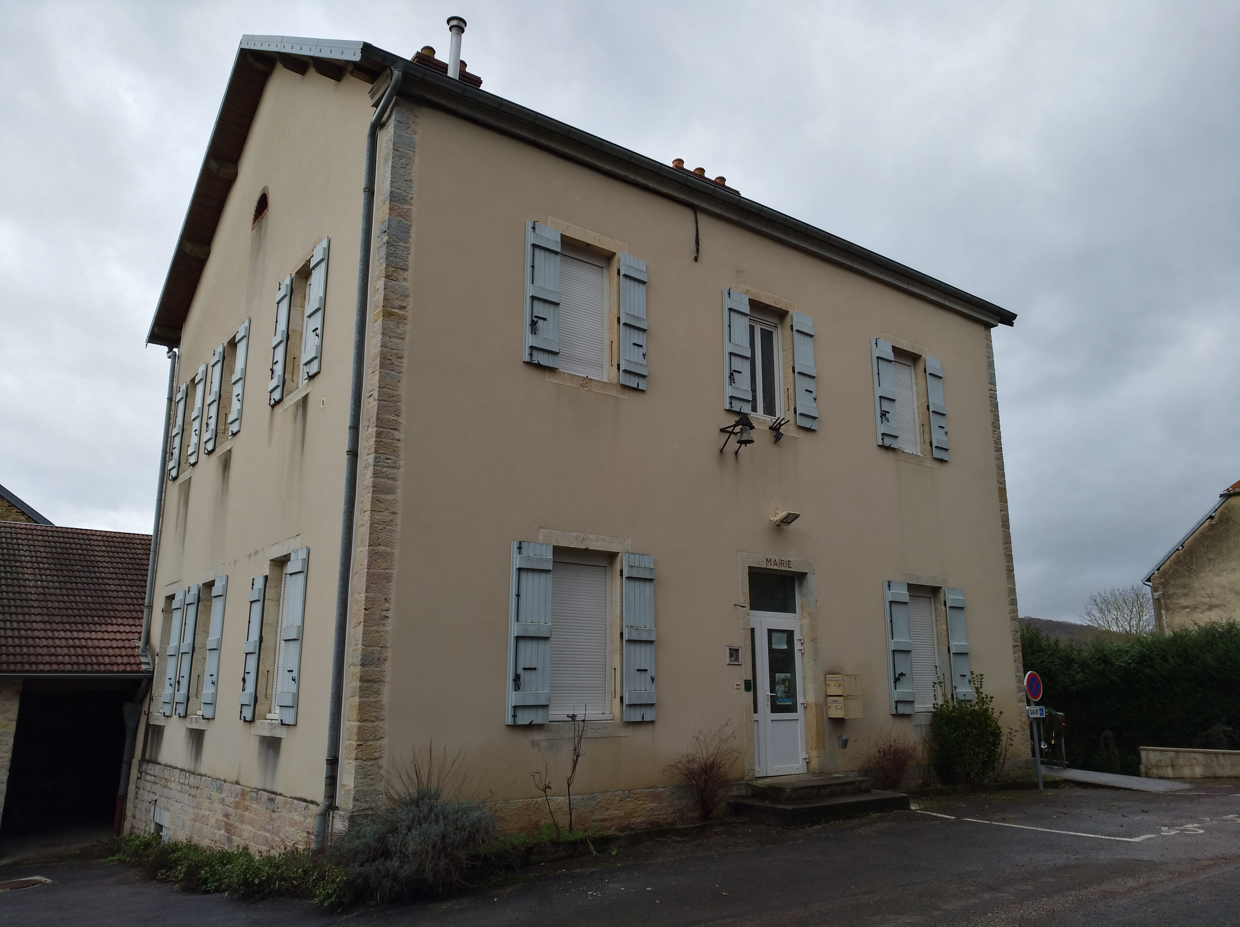 Taxenne (Jura, France) en janvier 2018.